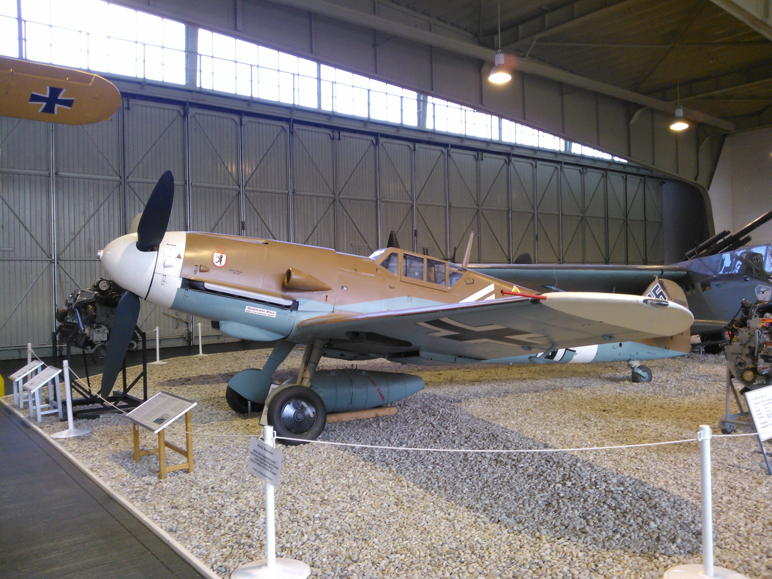 Gatower Rückbau